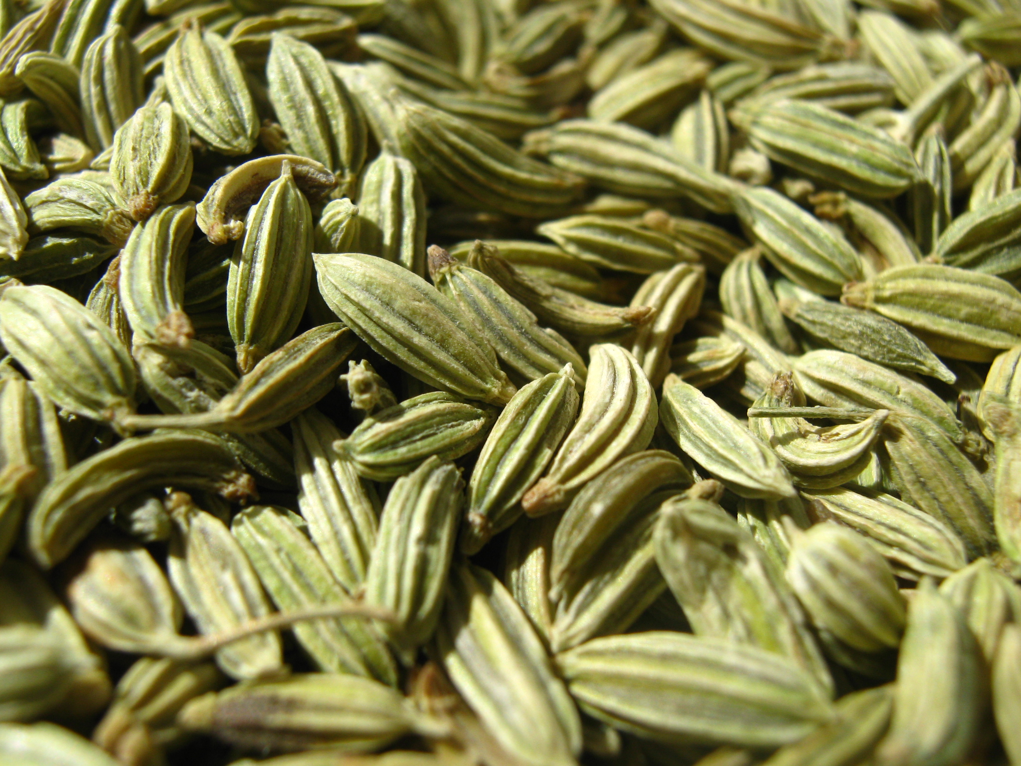 सौंफ